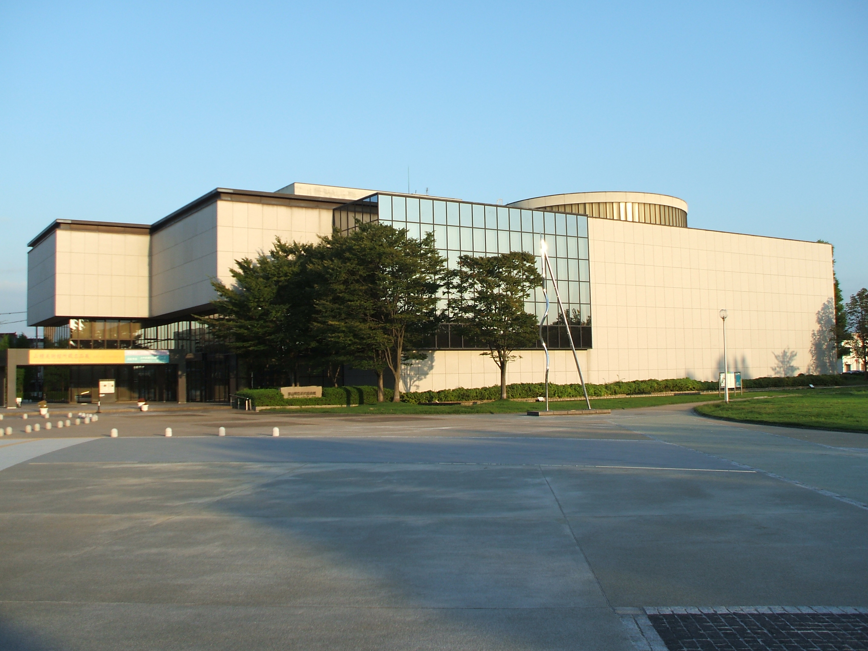 富山県富山市にある富山県立近代美術館